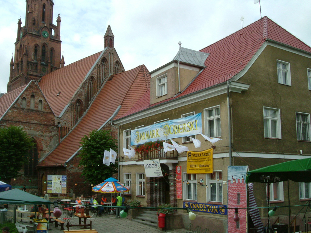 Rathaus und Marktplatz (Rynek) von Dobra Nowogardzka, links die Kirche der Heiligen Klara, aufgenommen während des Stadtfests Jarmark Doberski 2007